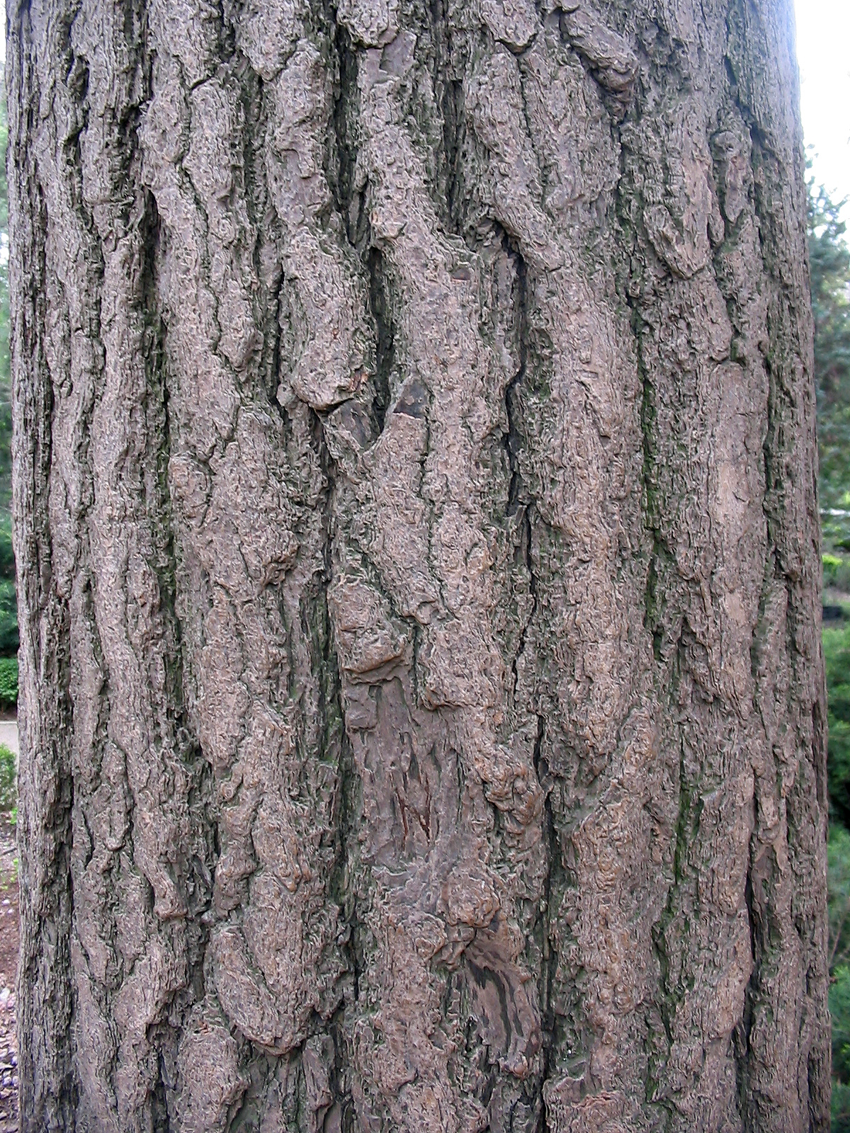 Fotografía de Pablo Alberto Salguero Quiles de la textura del tronco de Ginkgo biloba de las Ginkgoaceae, se le supone nativo de China. En España se le llama Arbol de los cuarenta escudos. La fotografía está realizada en el Real Jardín Botánico de Madrid. España. El 4 de Abril de 2007.